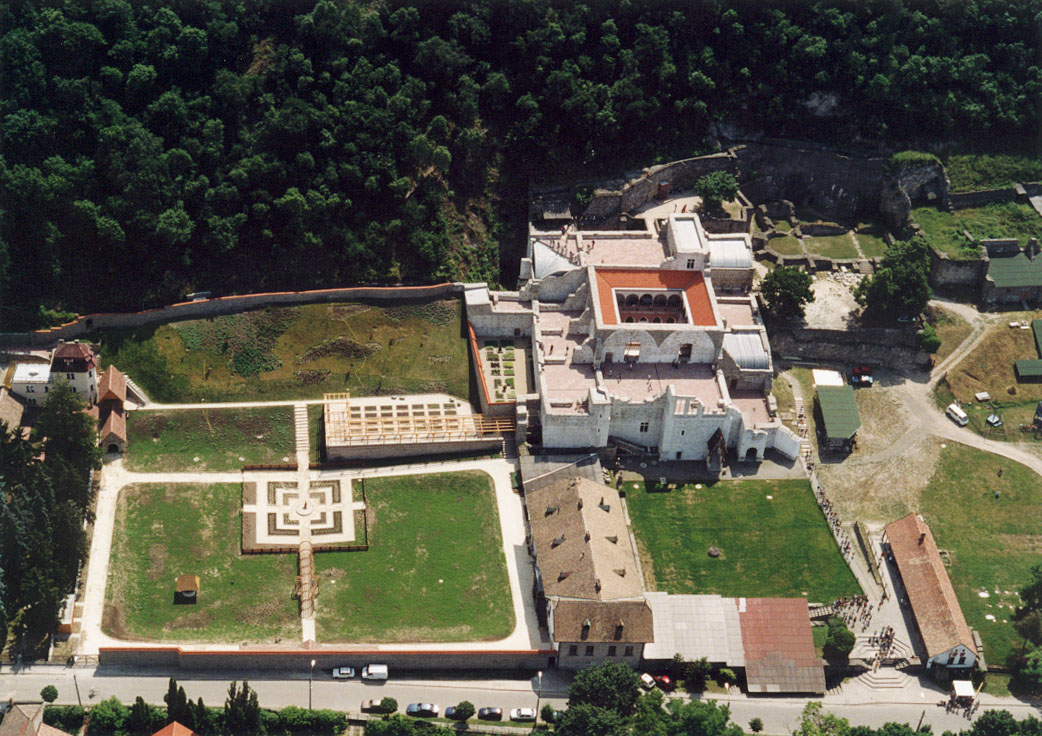 Royal Palace - Visegrád - Hungary - Europe